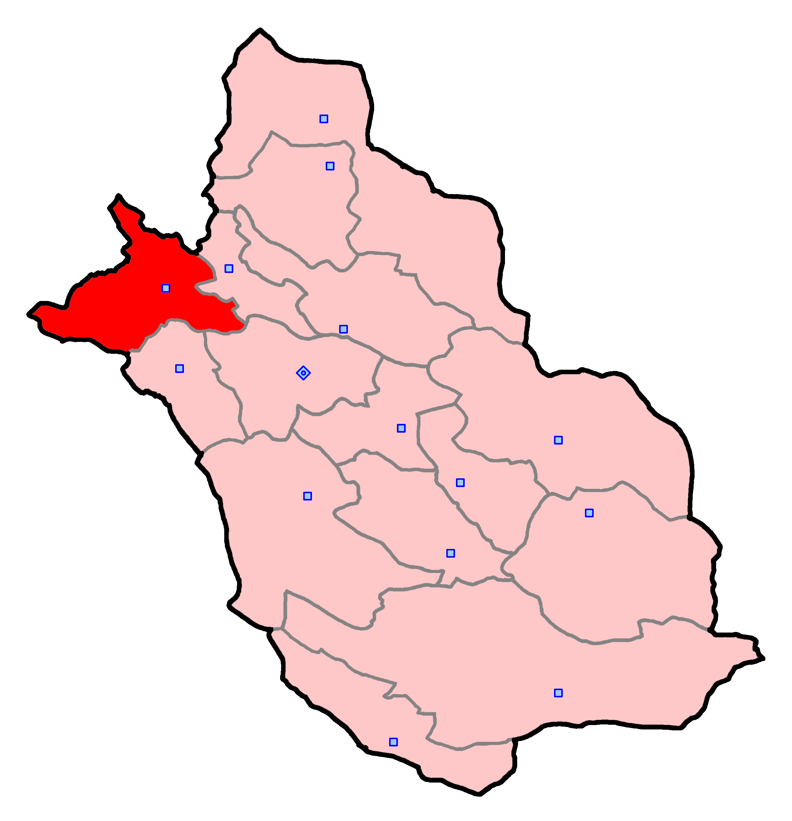 حوزهٔ انتخاباتی ممسنی برای انتخابات مجلس شورای اسلامی